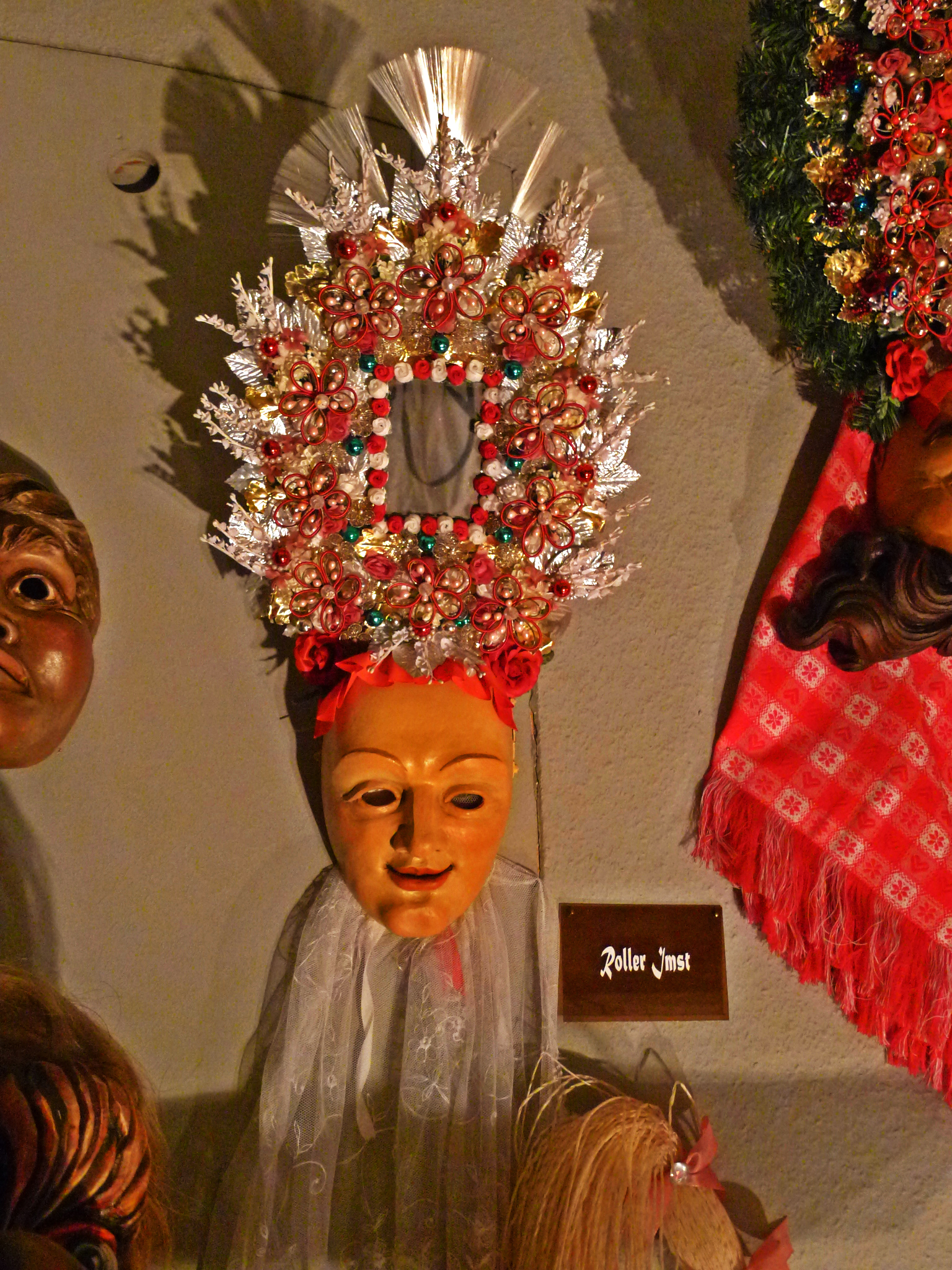 Roller von dem Imster Schemenlaufen, hier in der Oberrheinischen Narrenschau Kenzingen ausgestellt